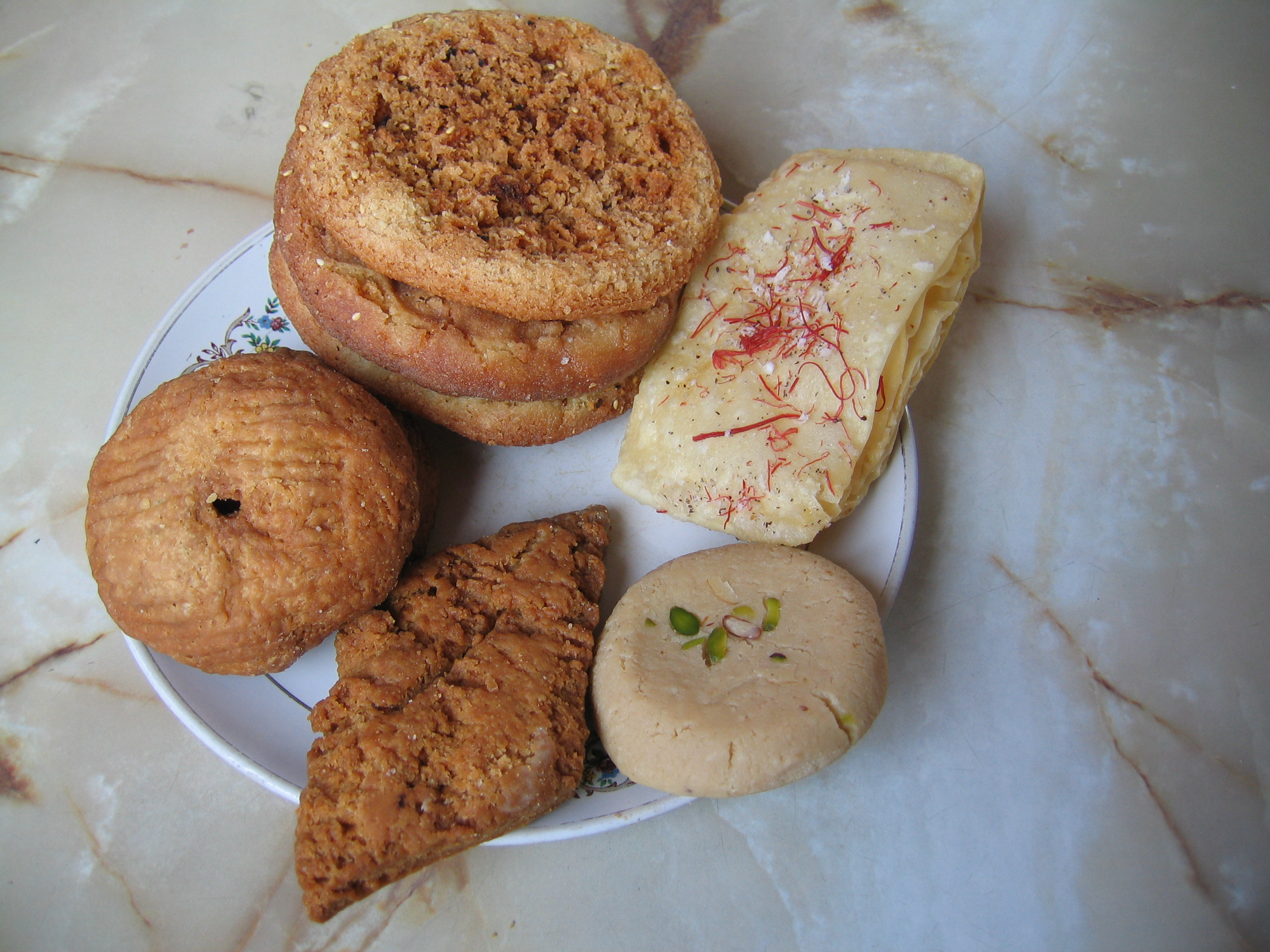 newari sweets